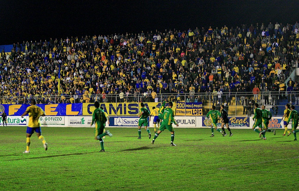 Pelotas 0 x 1 Ypiranga Estádio Boca do Lobo - 2008 Foto: Guilherme Tavares